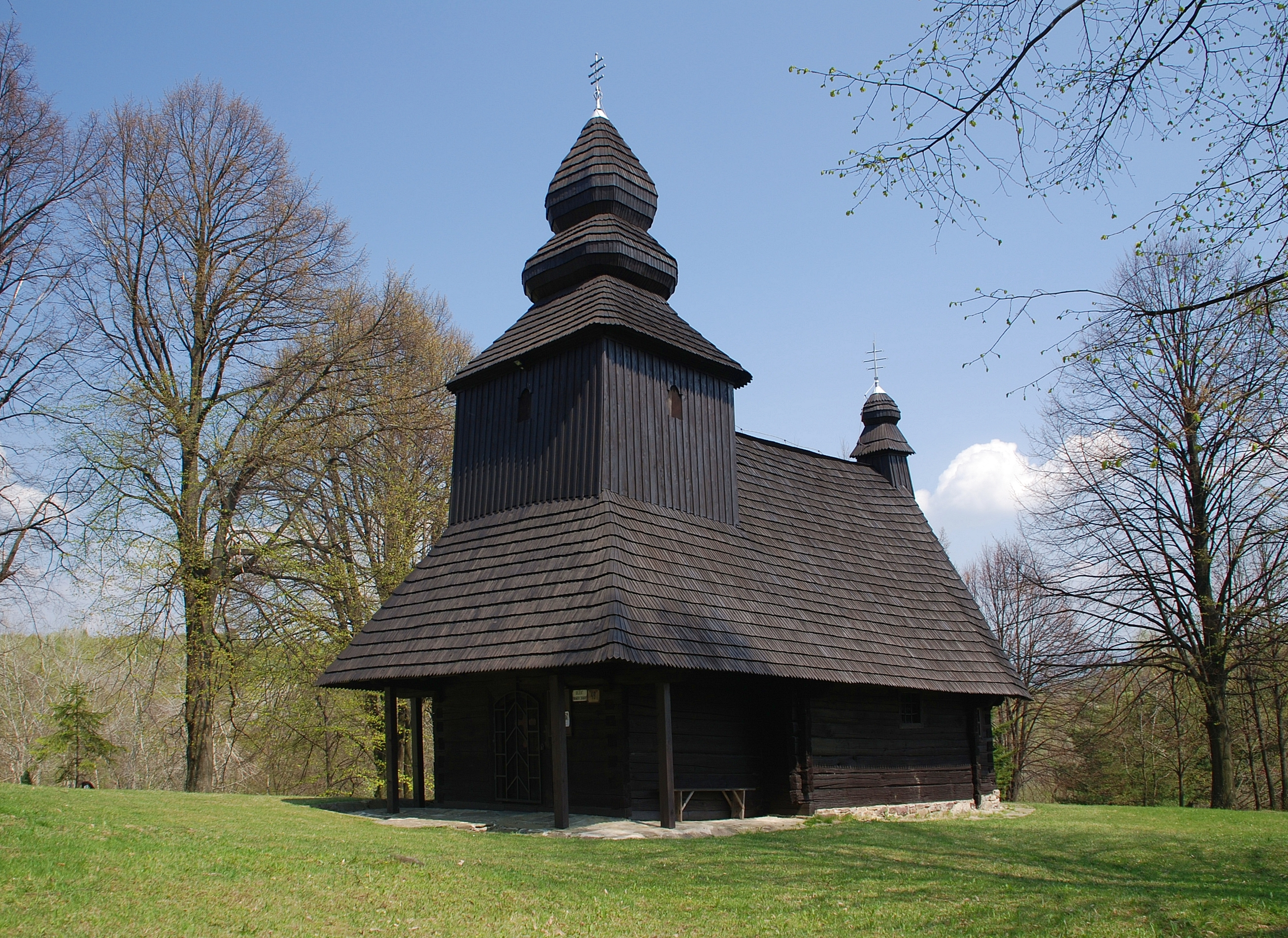 cerkiew